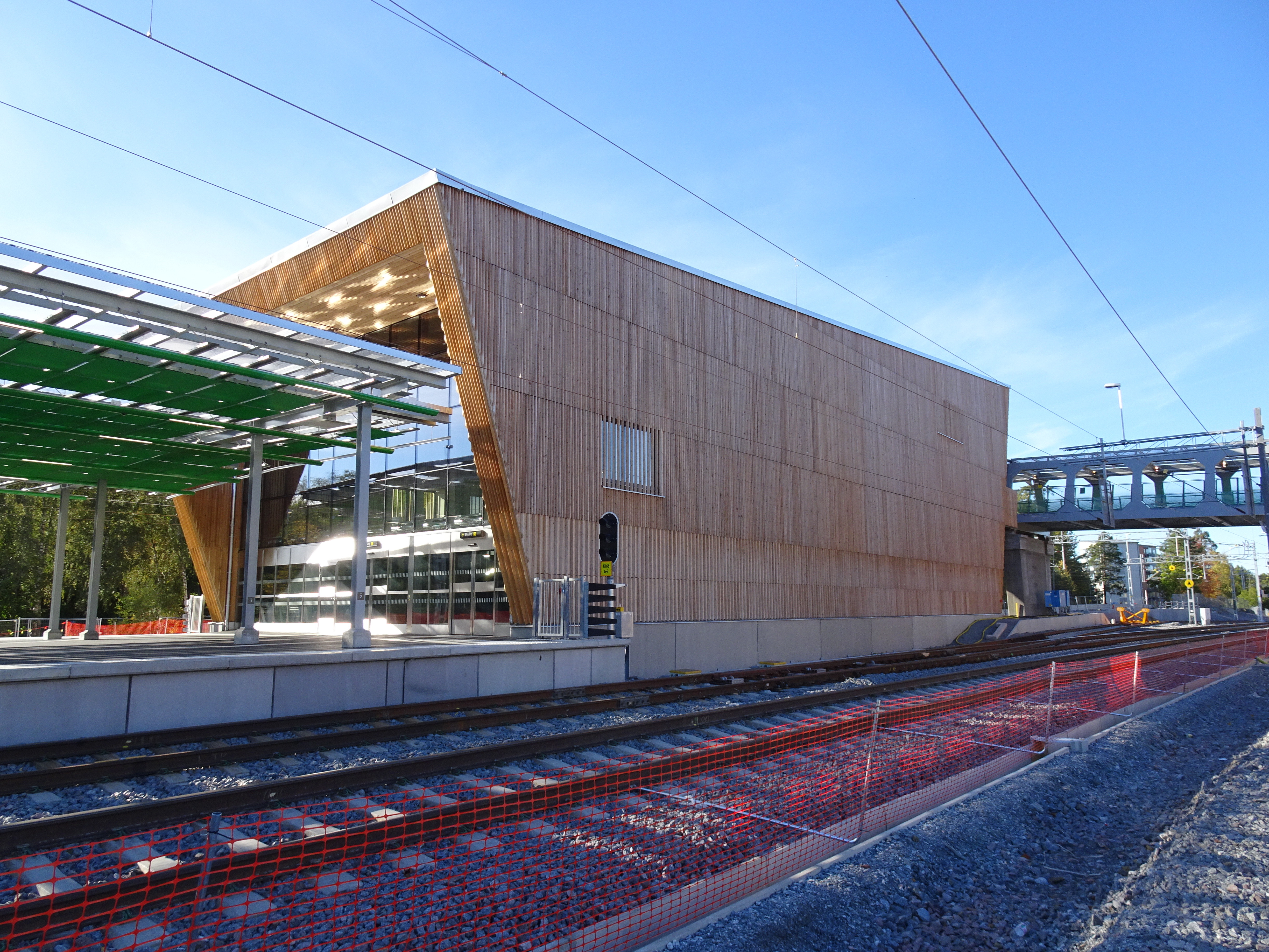 Kallhäll station